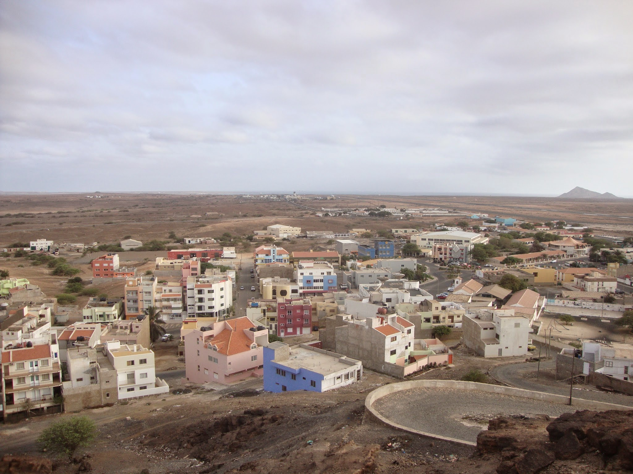 Vista a partir do miradouro da cidade de Espargos, em Ilha do Sal.